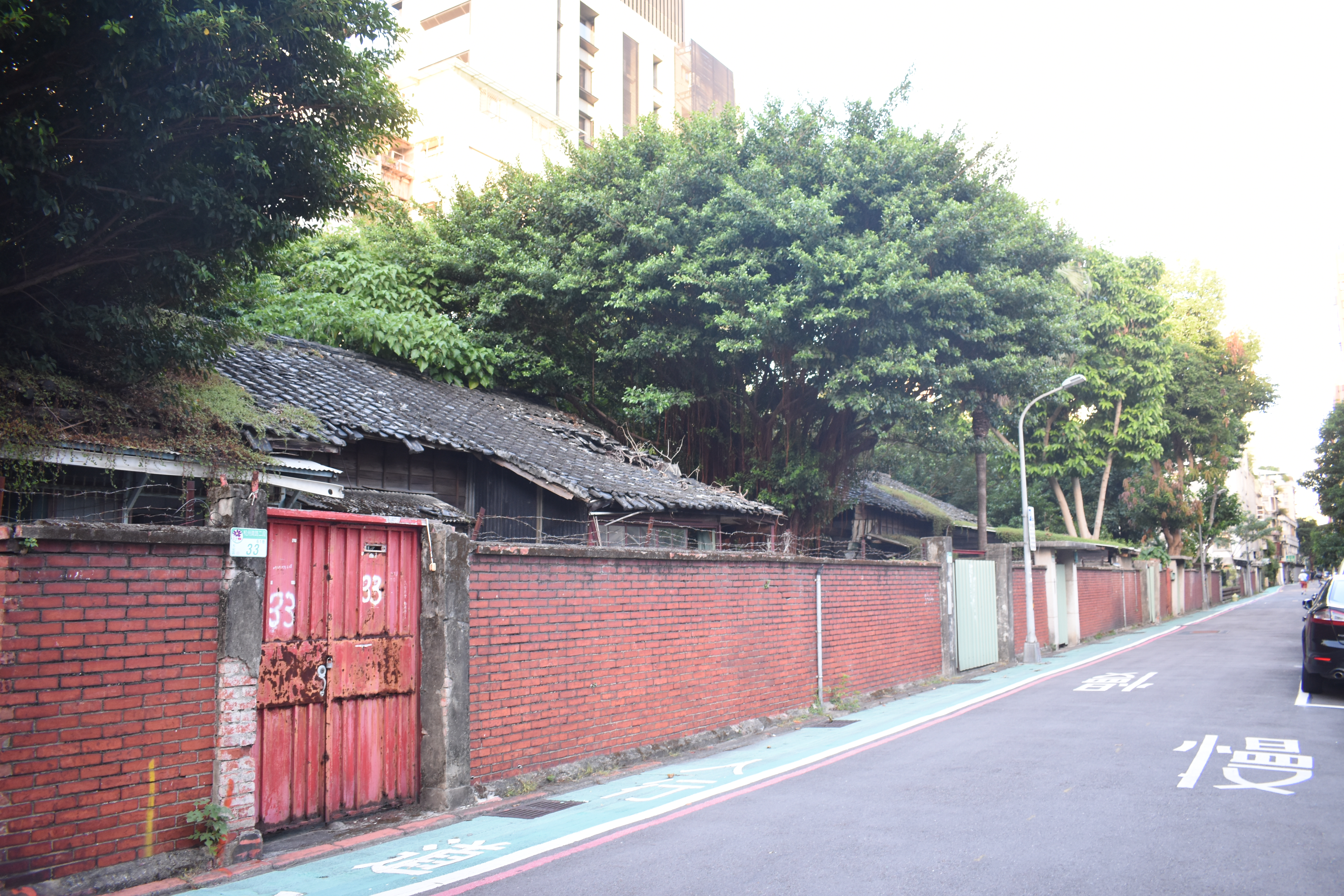 錦町日式宿舍群杭州南路2段61巷33、35號等